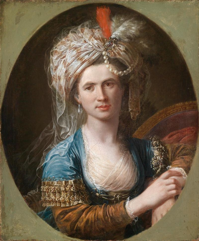 Umkreis von Angelika Kauffmann (1741–1807): Angebliches Porträt des französischen Diplomaten, Geheimagenten und Transvestiten Charles d’Éon de Beaumont genannt Le Chevalier d’Éon (1728–1810) in Frauenkleidung. Öl auf Leinwand, 64 x 52,4 cm. Versteigert 2014. MutualArt, London.